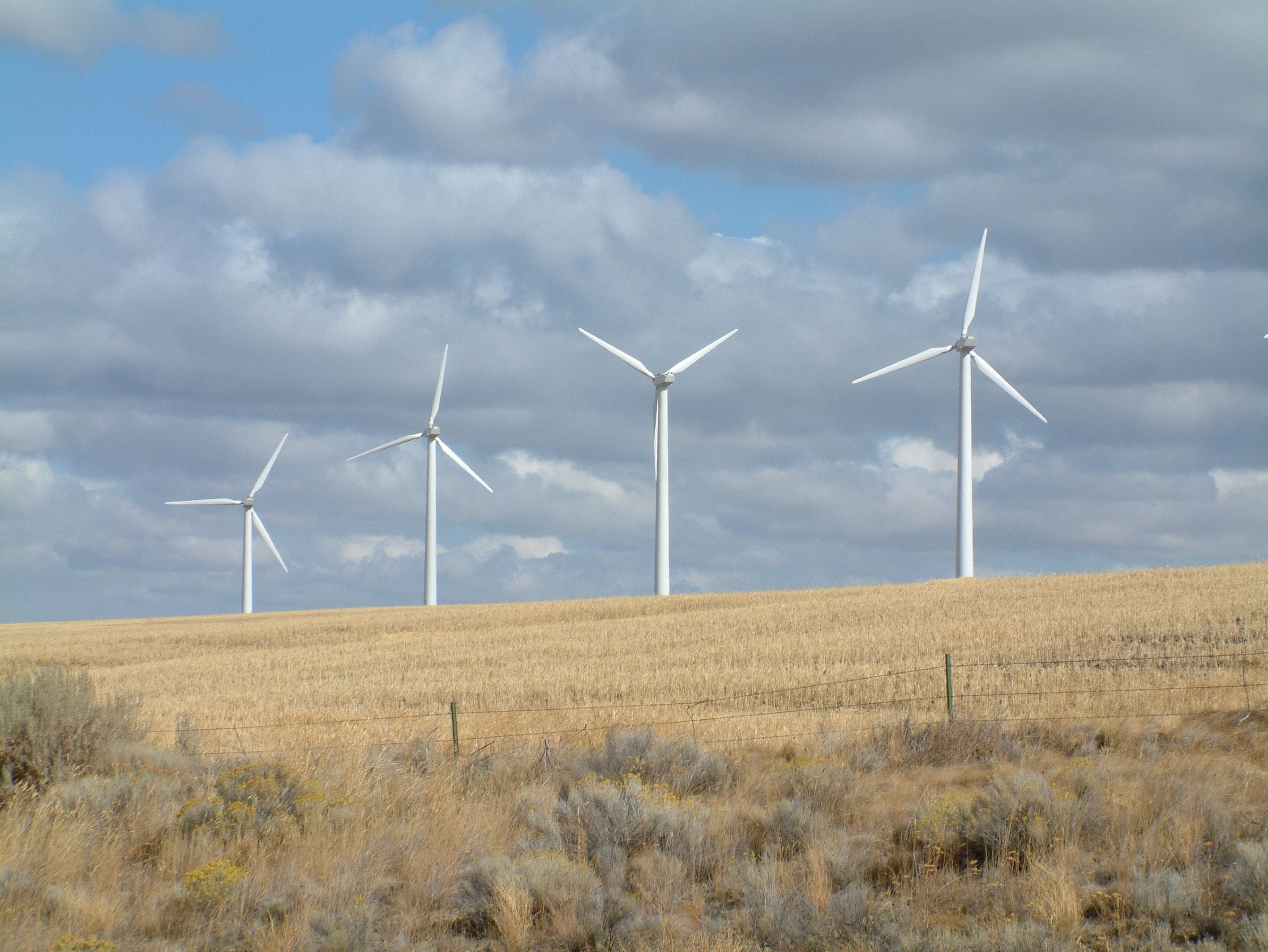 Wind Turbines in Eastern Oregon